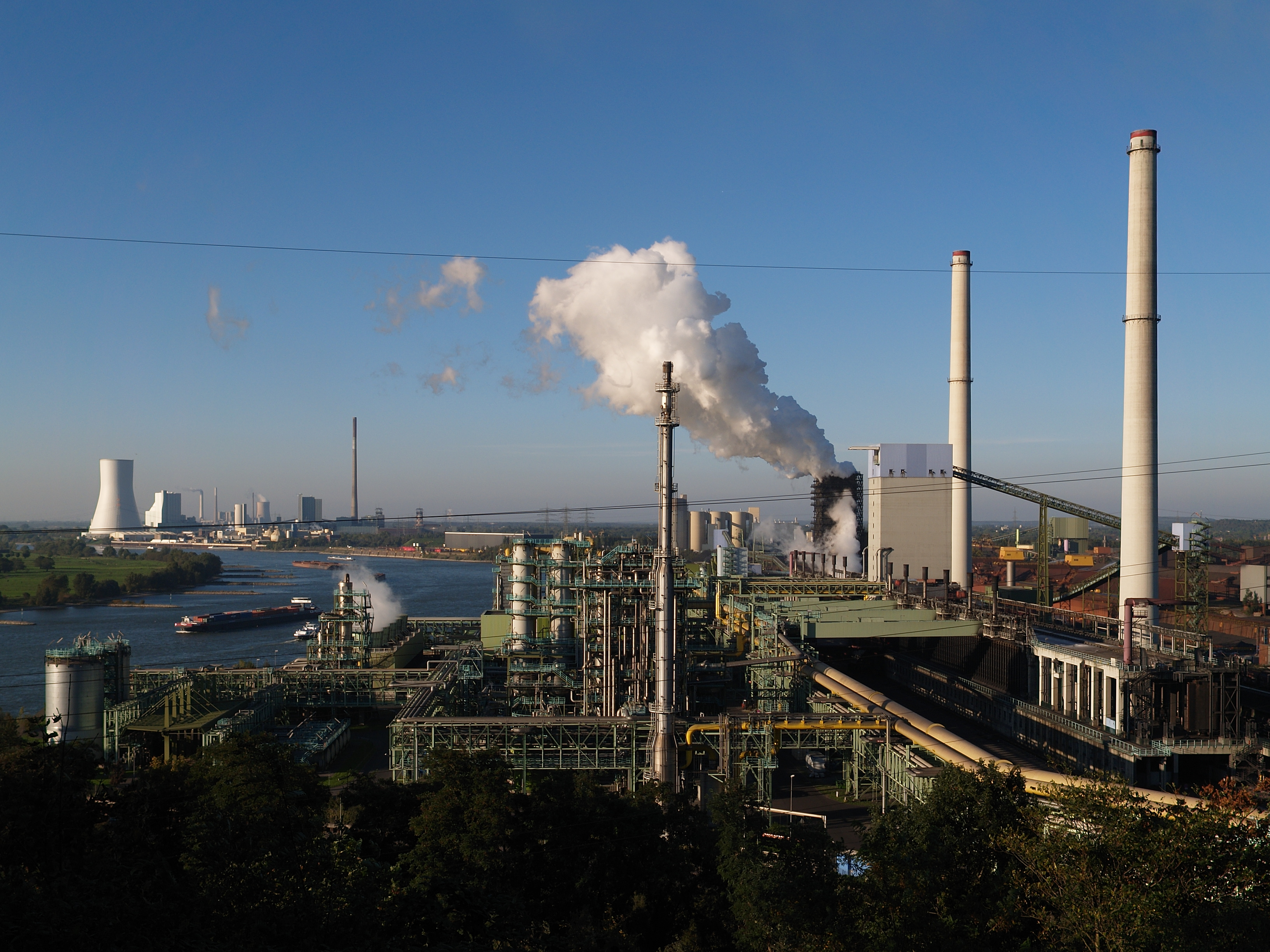 Ausblick vom Alsumer Berg Alsumer Berg nach Norden mit der Kokerei Schwelgern von ThyssenKrupp dahinter, am gleichen Rheinufer, die Kraftwerke Walsum und am Horizont Voerde.